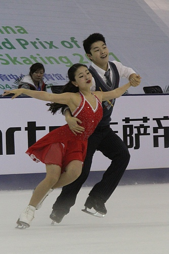 Майя Шибутани и Алекс Шибутани на Кубке Китая 2011